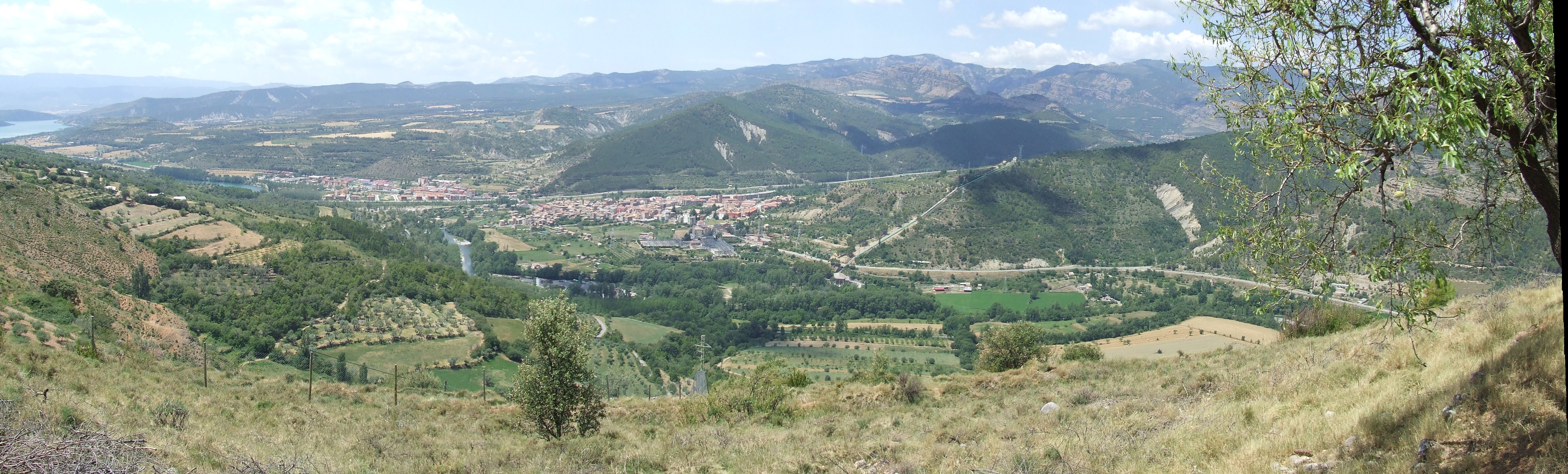 Vista panoràmica de la meitat occidental de la Conca de Dalt (Pallars Jussà)